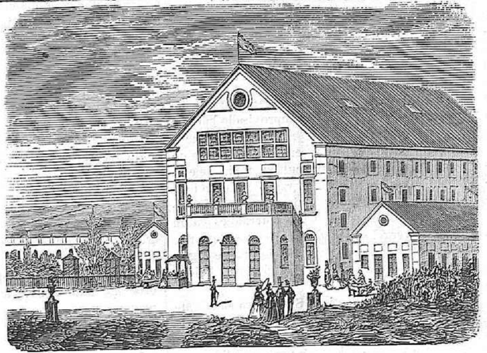 Teatro Rossini, en los Campos Elíseos de Madrid, grabado publicado en la publicación española El Periódico Ilustrado.